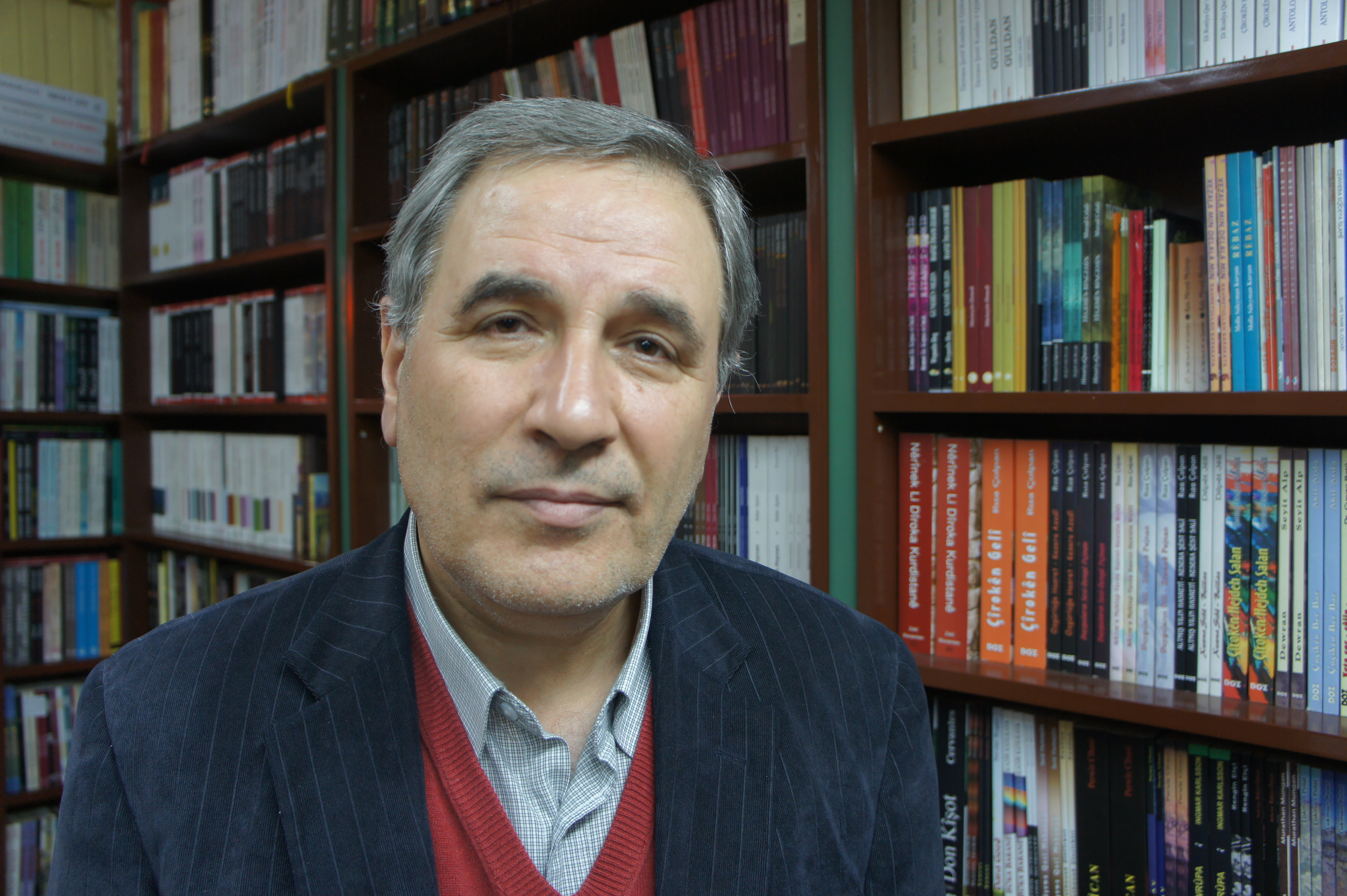 Kurdî: Nivîskarê kurd Rohat Alakom, 2010.